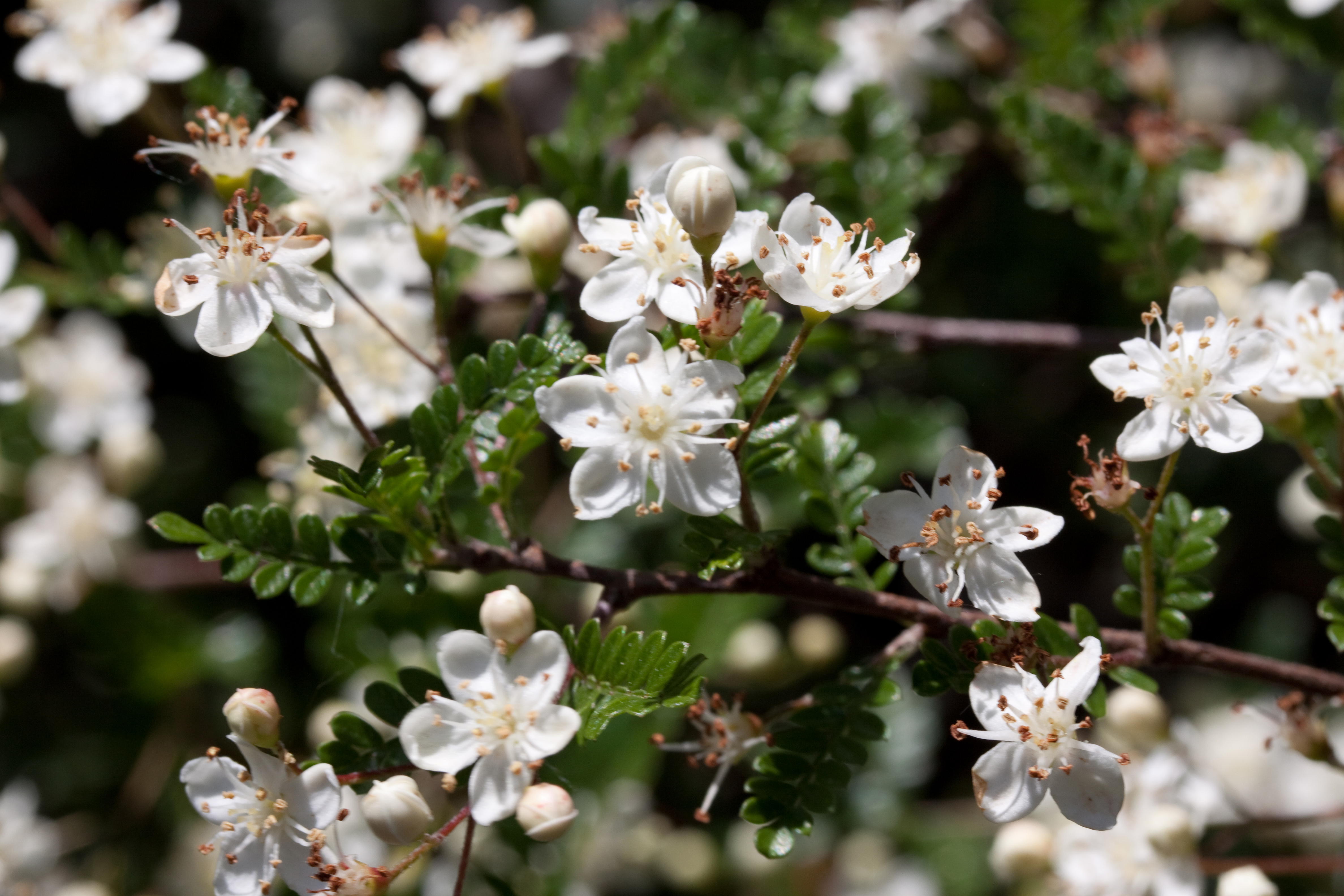 Fleurs d'Osteomeles schwerinae var microphyla - Jardin botanique de Strasbourg - France